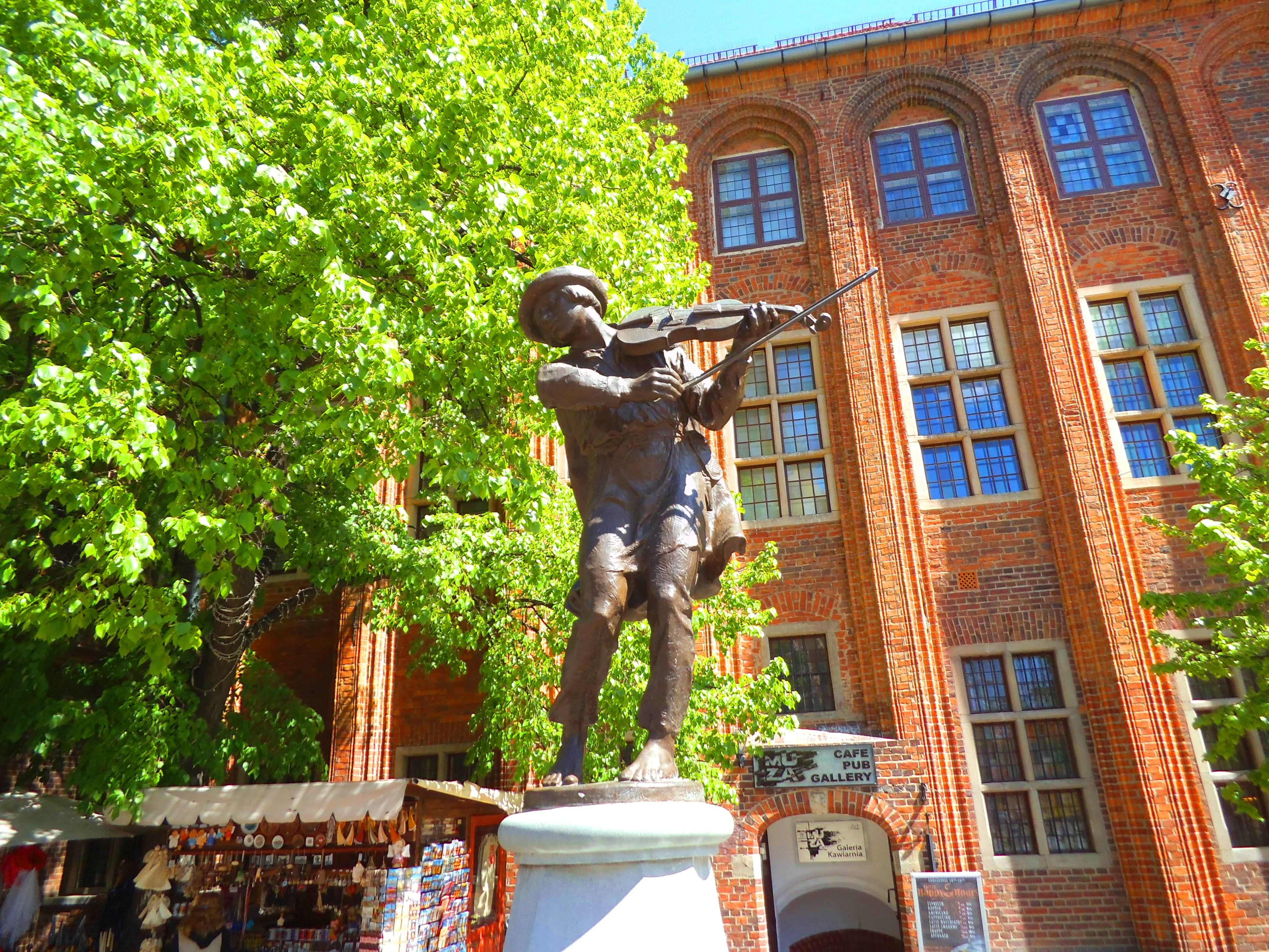 Pomnik flisaka w Toruniu